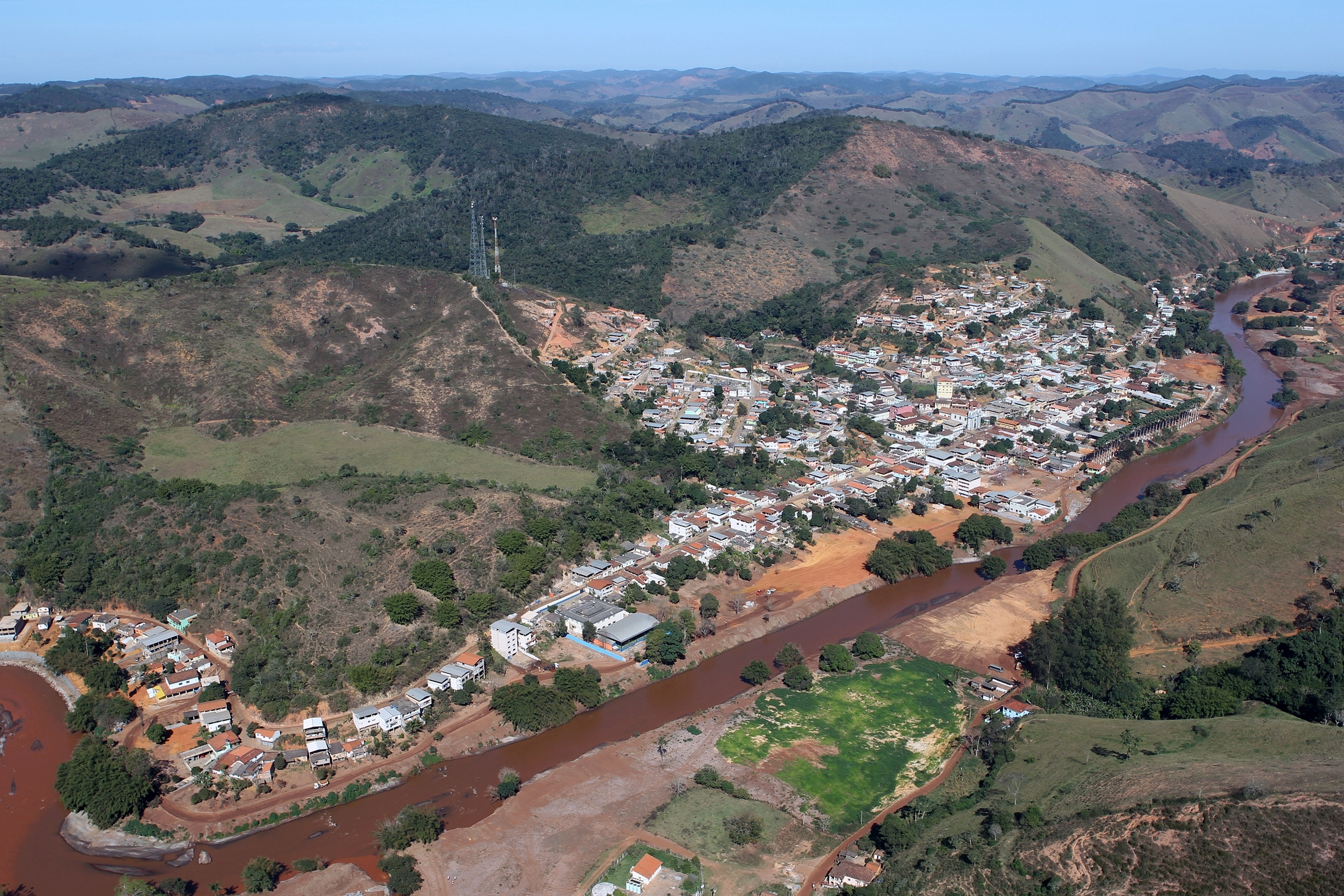 Vistoria do trecho atingido pelo rompimento da barragem de rejeitos da mineradora Samarco, em Barra Longa, Minas Gerais. Foto: Felipe Werneck - Ascom/Ibama